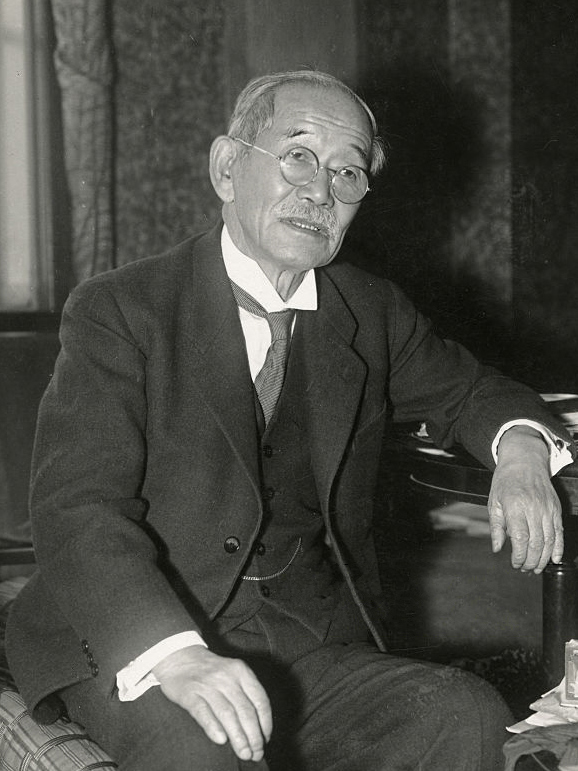 Jigoro Kano in Japan.